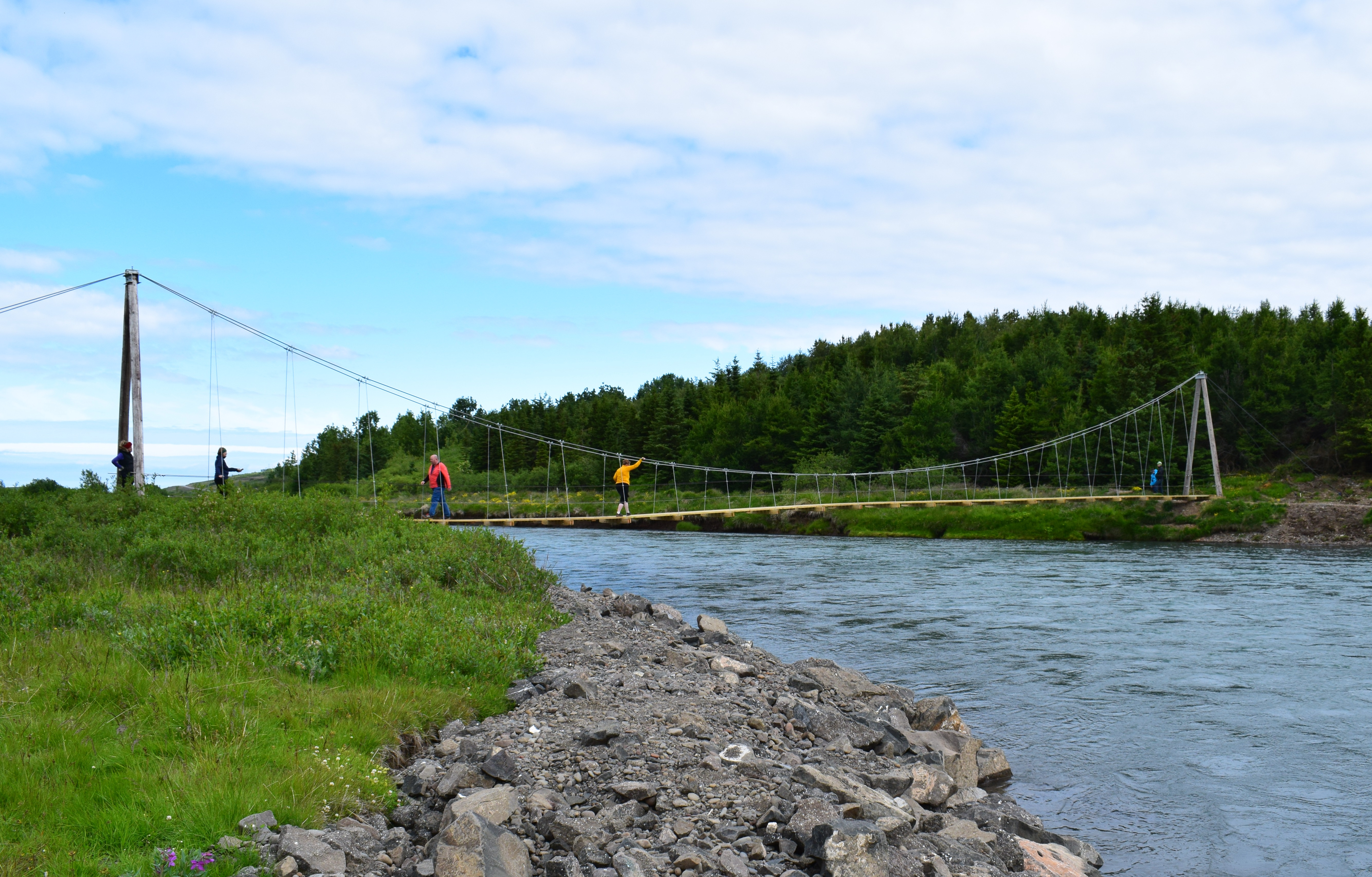 Göngubrú yfir Svarfaðardalsá neðan Hánefsstaða